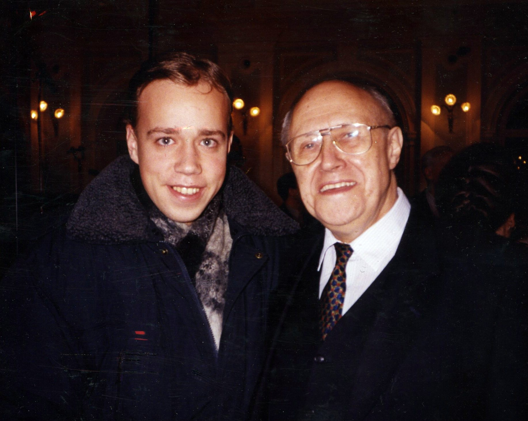 Алексей Хевелев и Мстислав Ростропович. Москва, Рахманиновский зал Московской консерватории, 1997 г.